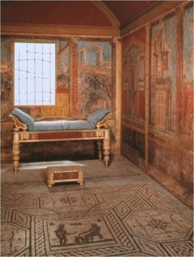 Llit